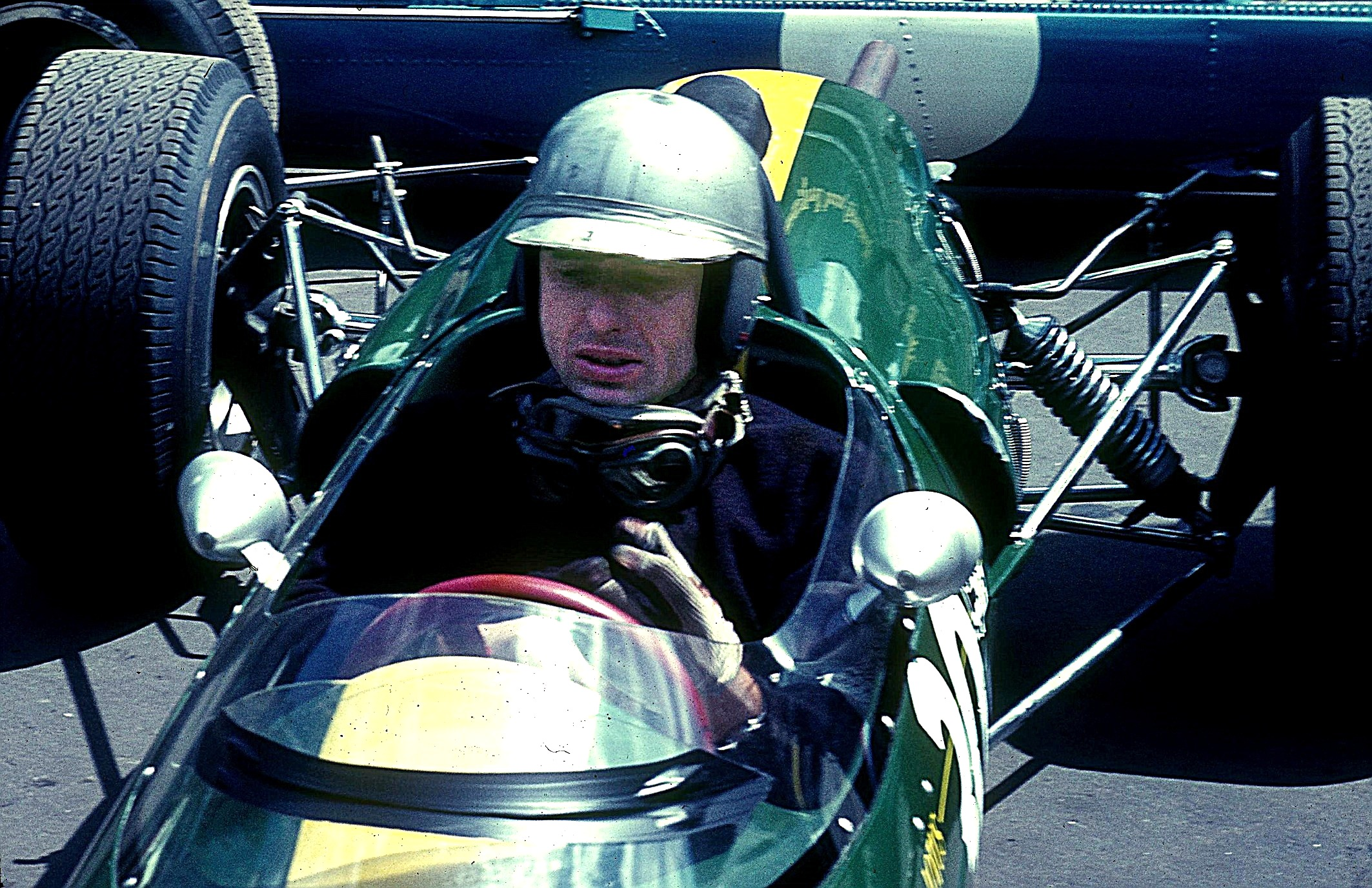 Gerhard Mitter 1966 im Lotus Formel 2